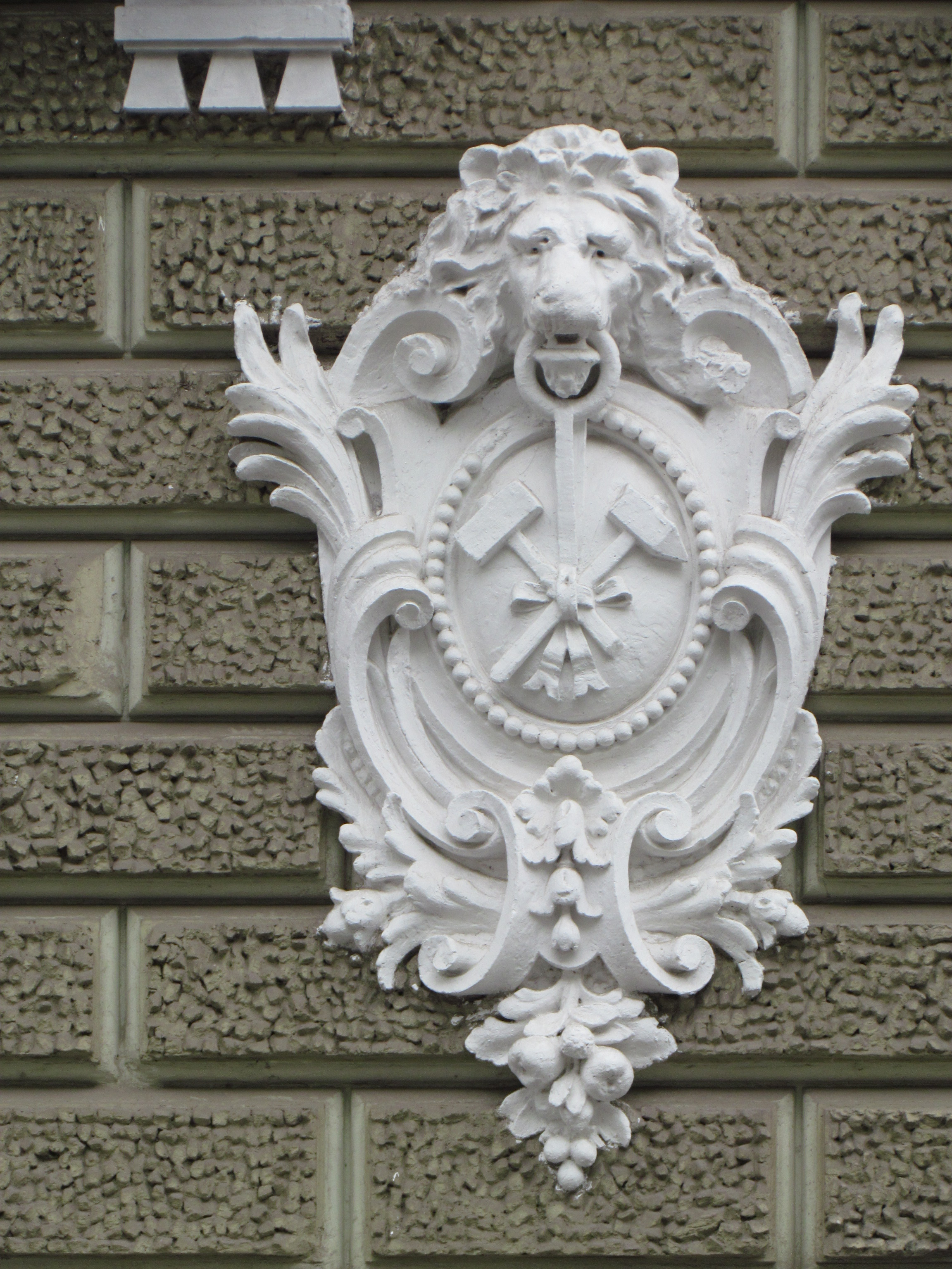 Україна, Харків, вул. Сумська, 18-20